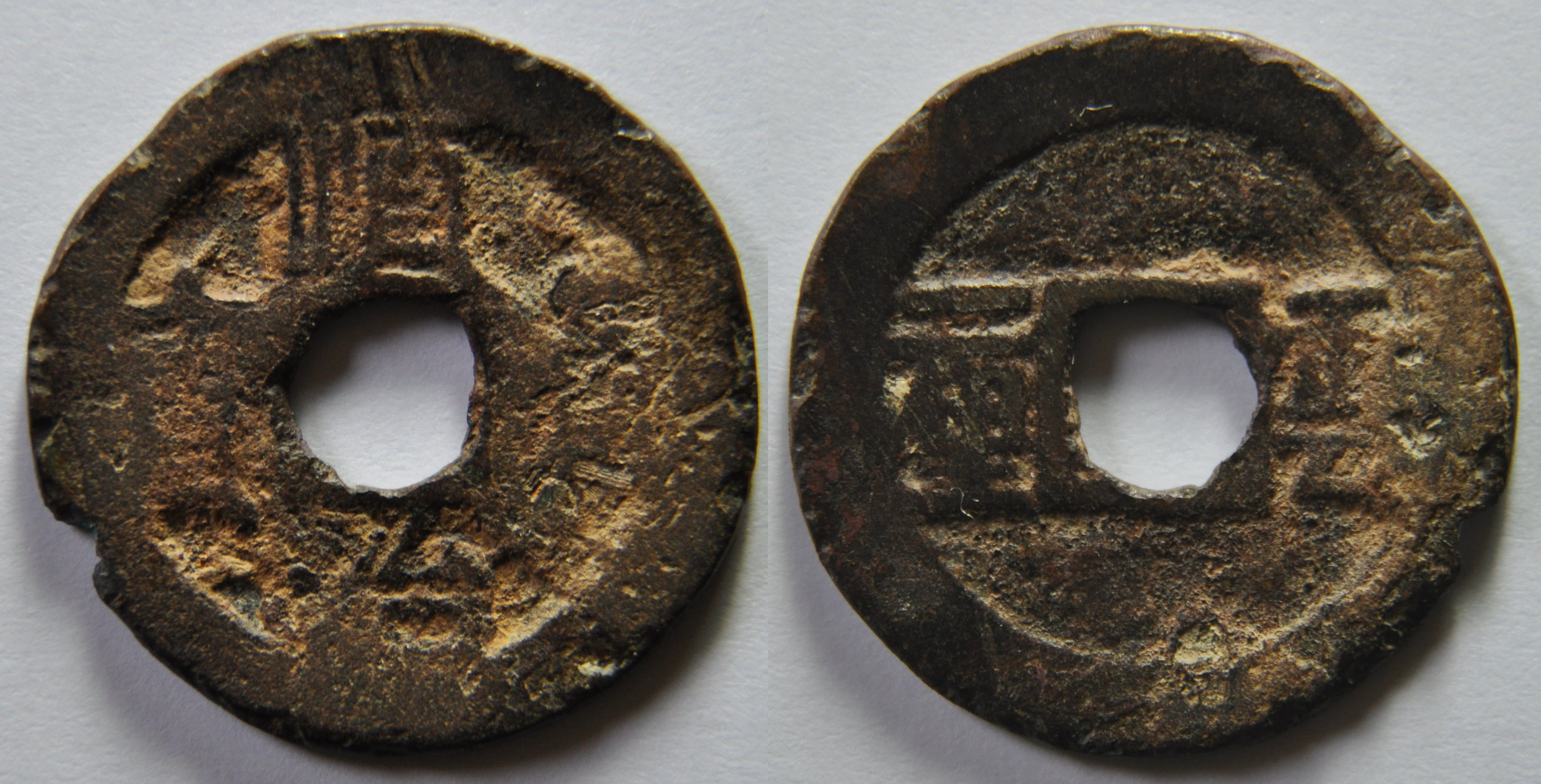 Une monnaie en bronze ou en cuivre d'une sapèque (1 cash) de l'empereur Shi Zu (1644-1661), ère Shun Zhi de la dynastie Qing (1644-1912) pour l'atelier du Yunnan. La monnaie se lit en croix. A/ Shun Zhi tong bao (Monnaie courante de Shun Zhi) R/ Yi li à gauche (1 li) Yun à droite Dimension : 25,12 mm Poids : 3,05 g. Remarque : Cette monnaie a été émise entre 1659 et 1661 par le général Wu Sangui après avoir repris le Yunnan au prince Yongming. La monnaie est bien abîmée. Référence : H22.66 Indice de rareté : 13, très commune d'après D.Hartill.